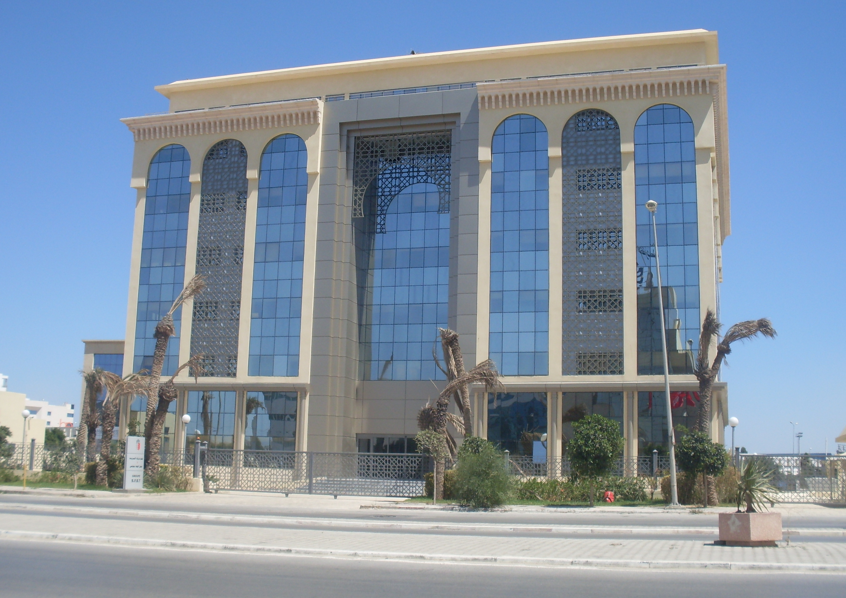 Tunis, siège de la SFBT